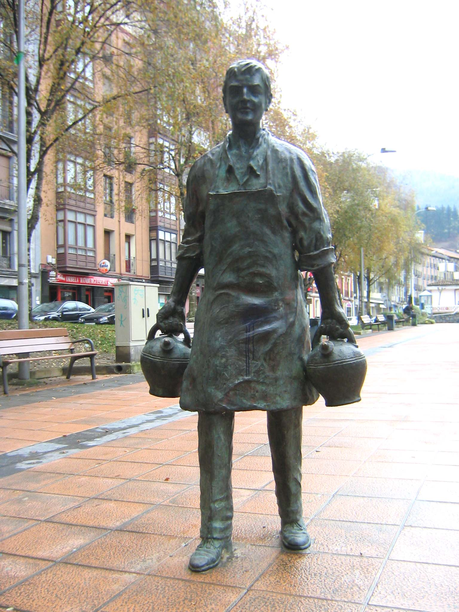 Estadua dedicada al "botijero" el pinche que llevaba agua en botijos a los talleres en Eibar, Guipúzcoa (País vasco) (España).